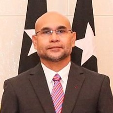 Botschafter Gil da Costa bei der Vereidigung